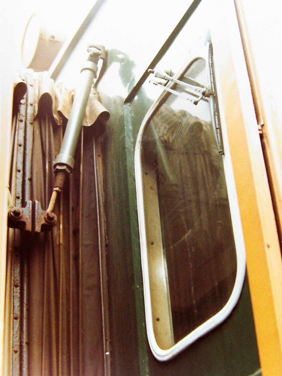 国鉄80系電車 モハ80形の簡易運転台 80325